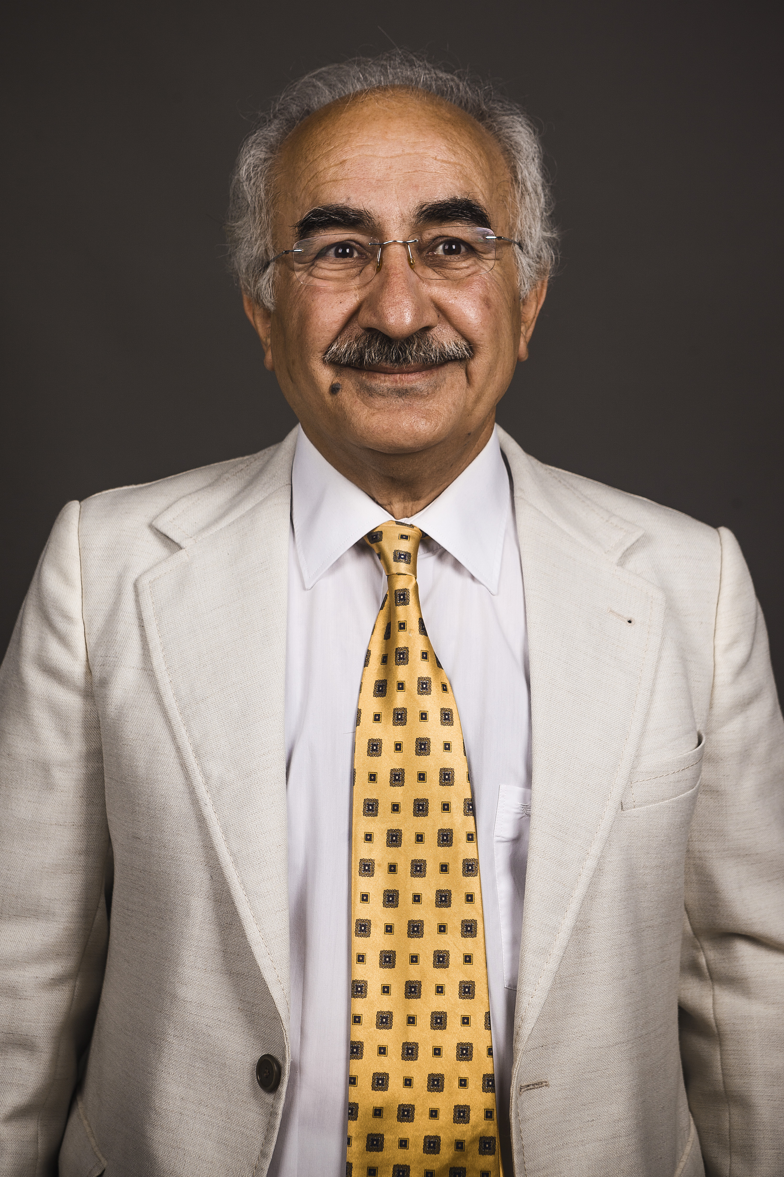 Yekta Uzunoglu